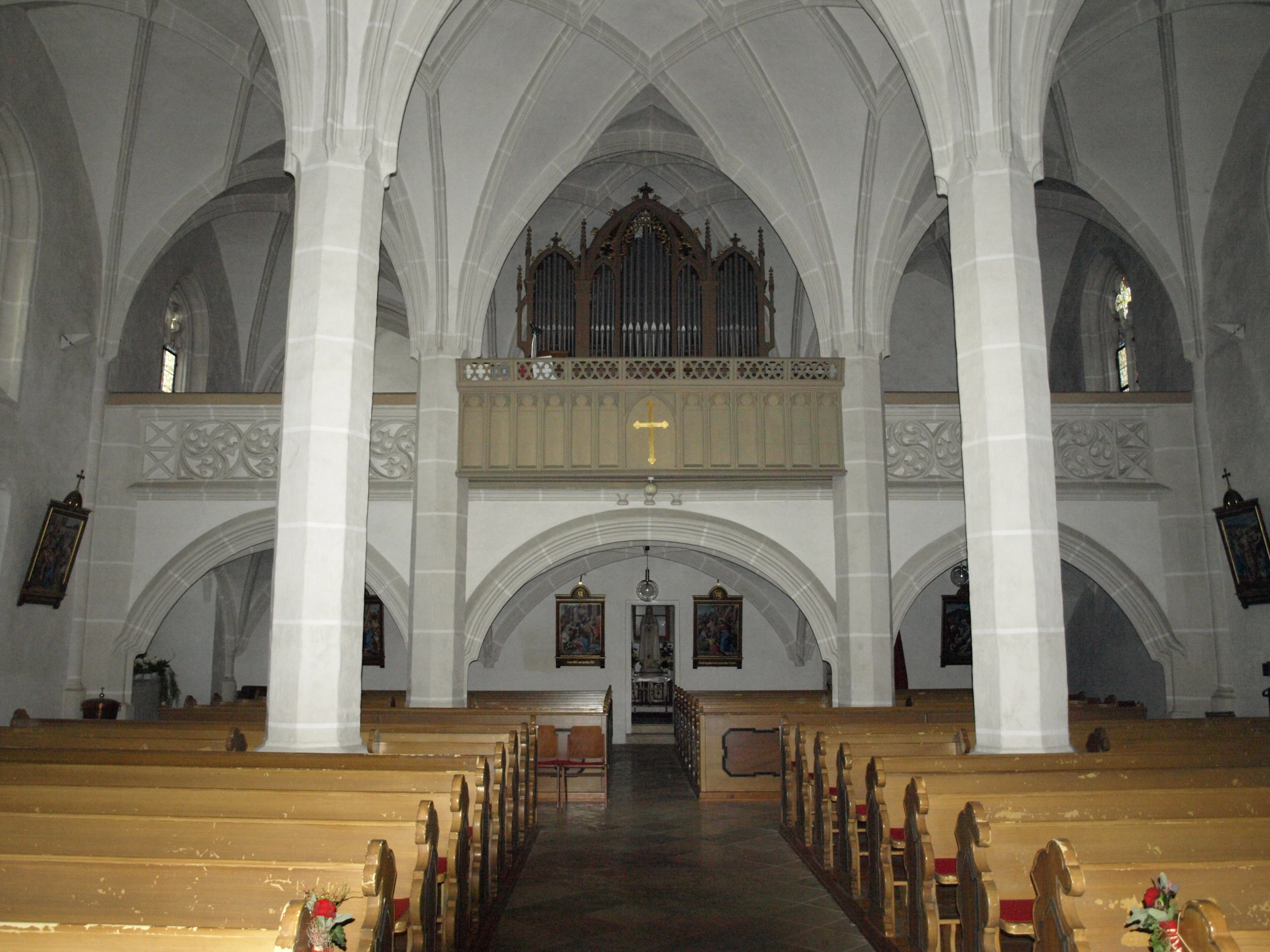 Kath. Pfarrkirche Mariae Himmelfahrt